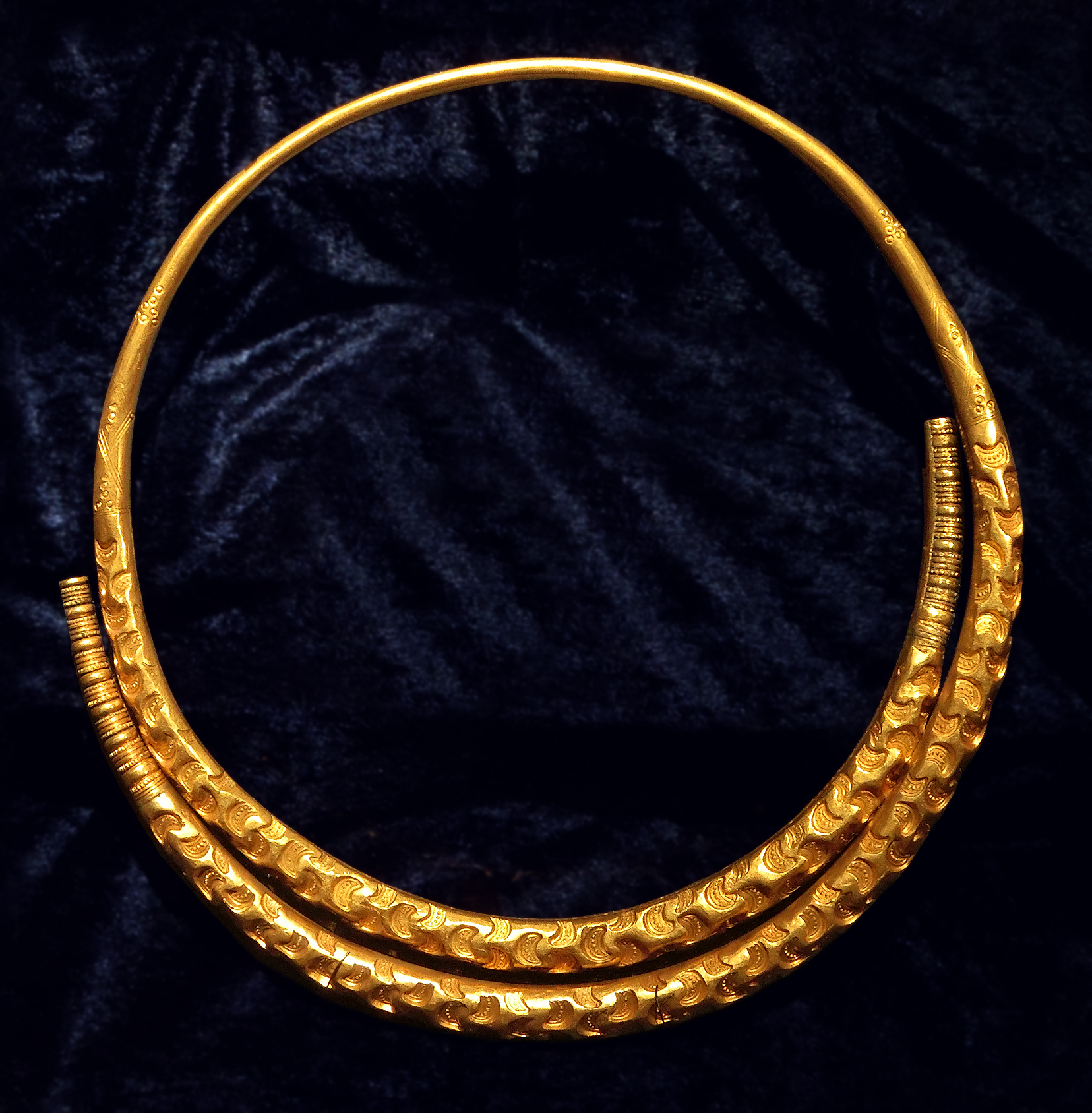 Kopia av Bragnumringen från Storegården i Bragnum, Floby socken, Vilske härad, Falköpings kommun, f.d. Skaraborgs län, Västergötland, Västra Götalands län, Sverige. Den folkvandringstida guldhalsringen hittades av änkan Maria Christina Johansdotter i en åker tillhörande Storegården i Bragnum. Fyndplatsen har RAÄ-nummer Floby 82:1. Guldhalsringen inlöstes 1878 av Historiska museet i Stockholm och har där inventarienummer SHM 6234. En kopia i förgylld brons tillverkades 1936 och denna inköptes av Falbygdens museum i Falköping där den har inventarienummer 1686 (2M16-F1686). Sedan 1994 visas kopian av Bragnumringen i museets utställning Forntid på Falbygden. Fotot är dock taget i den tillfälliga utställningen Finnestorp - Mossen, makten och guldet, som visas sommaren 2013 på Falbygdens museum i Falköping, Västergötland, Sverige.